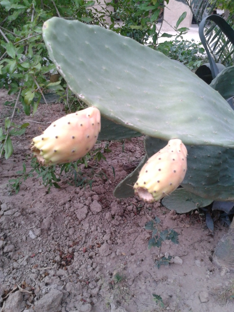 ميوه كاكتوس